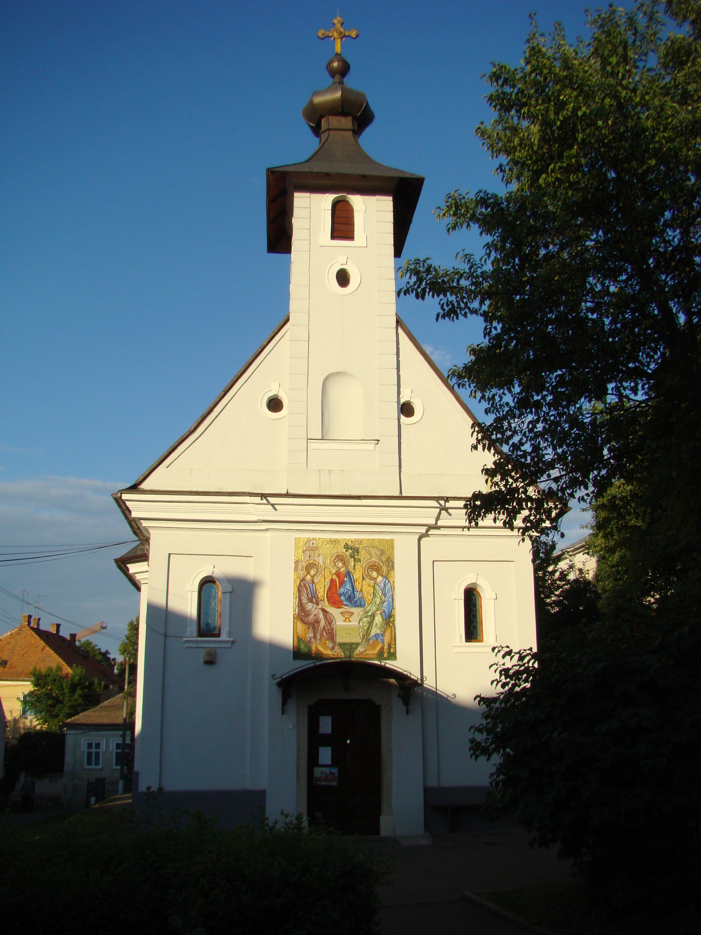 Biserica Ortodoxă Sf. Treime din Cluj